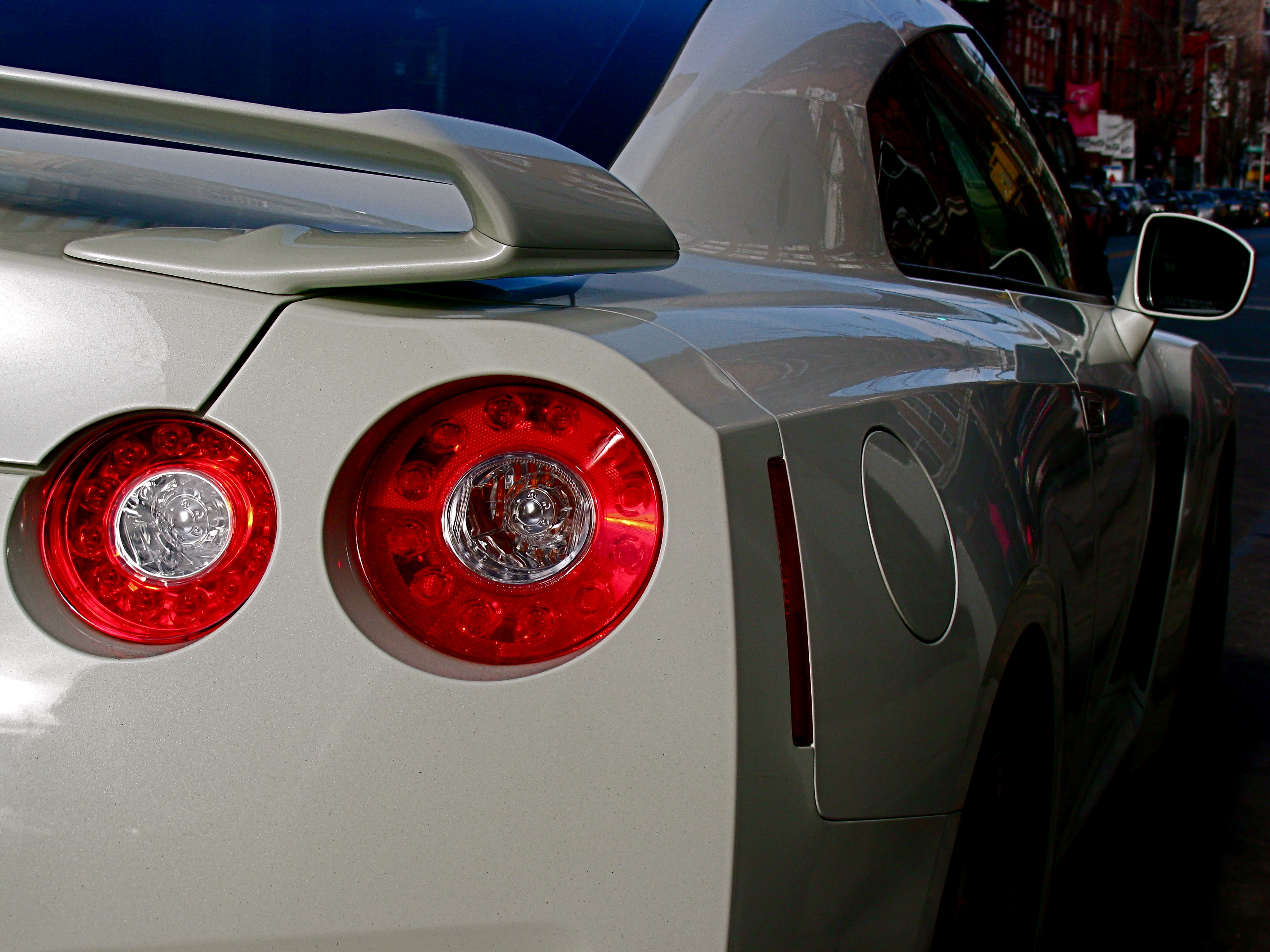 I do.